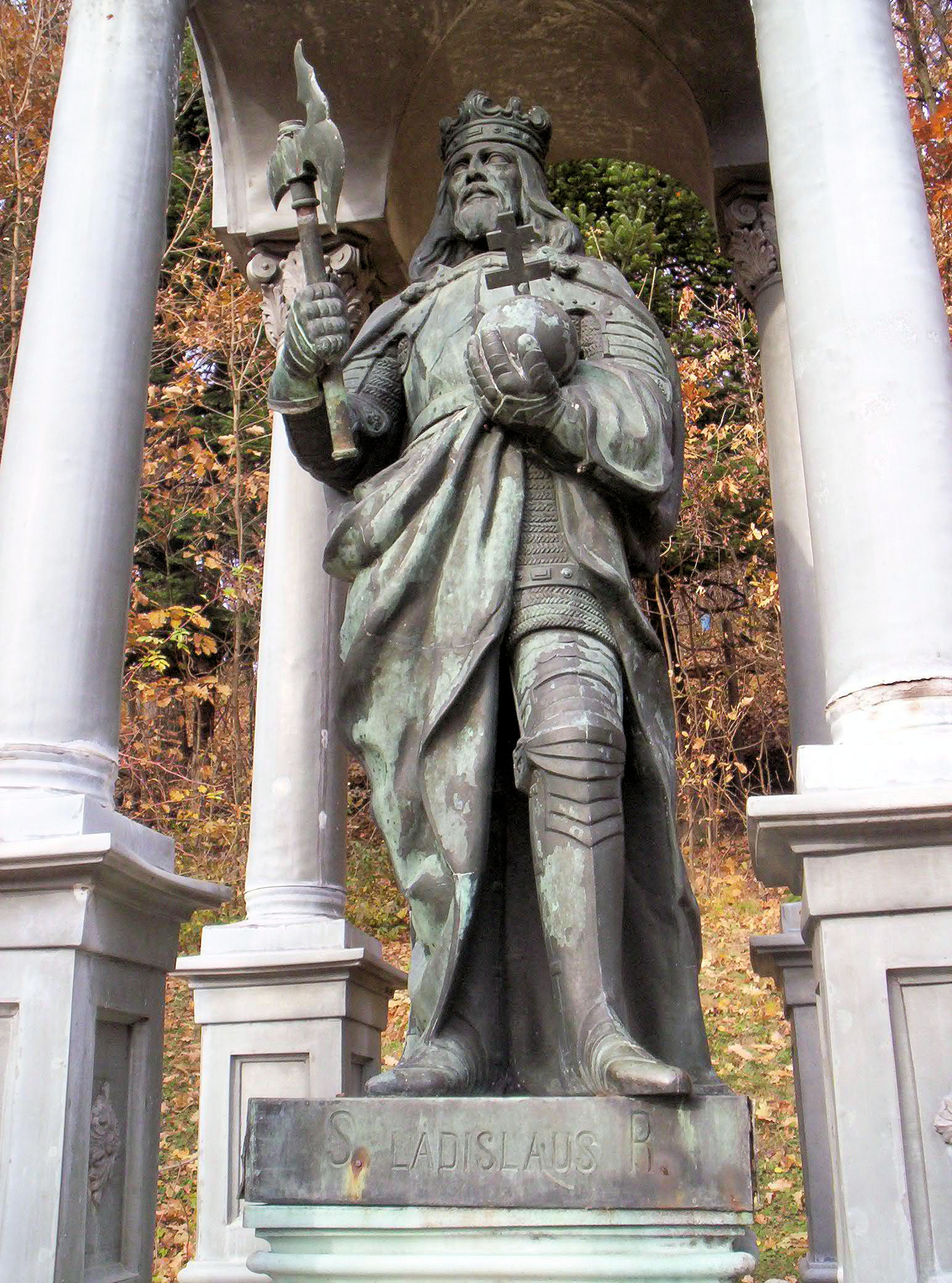 Szent László szobra Püspökszentlászlón. A szobrot Hettyey Sámuel püspök a püspökszentlászlói arborétum alapítója helyeztette el 1903-ban. Csukás Zoltán alkotása. – photo taken by uploader User:Csanády in 2006.